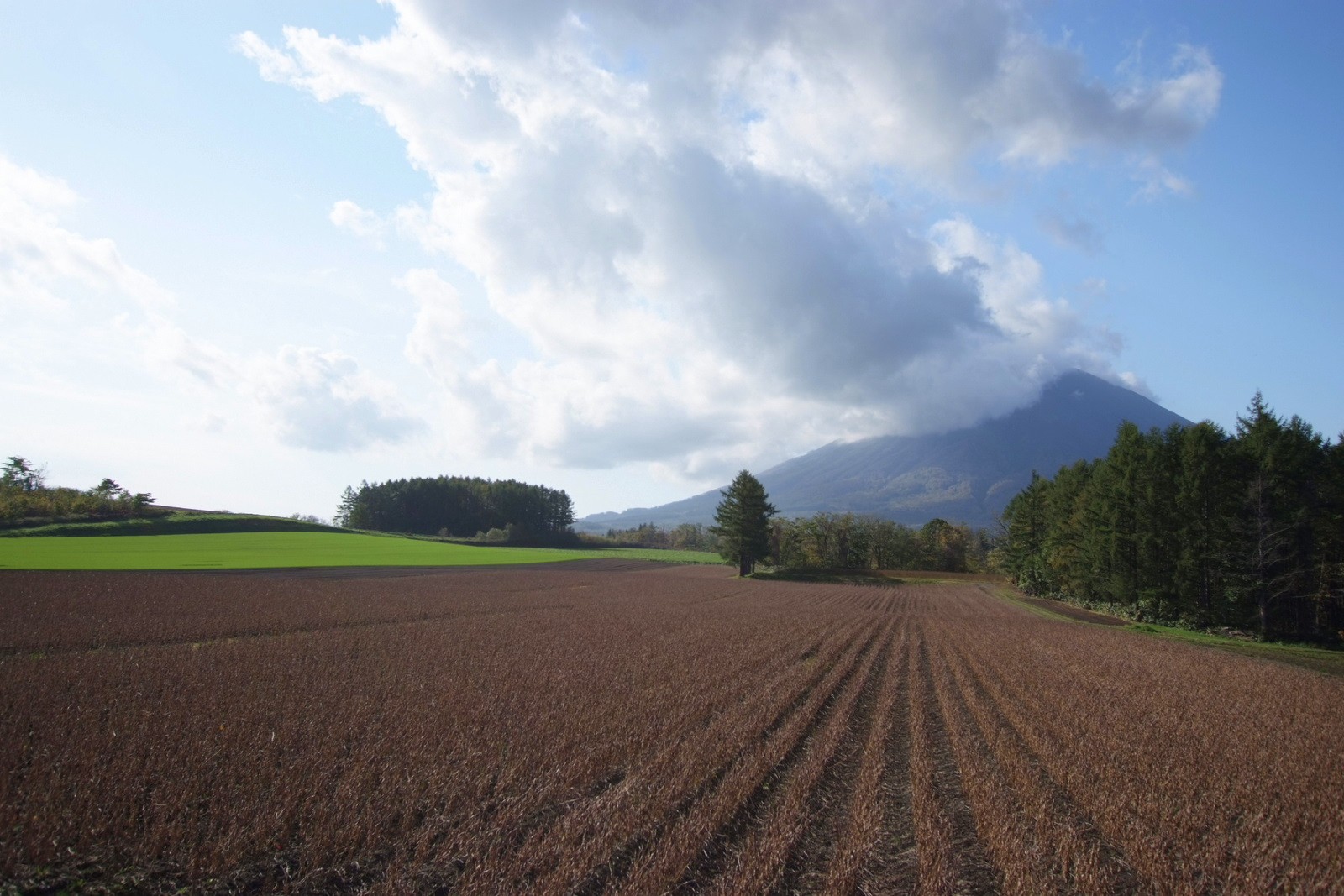 Route 276